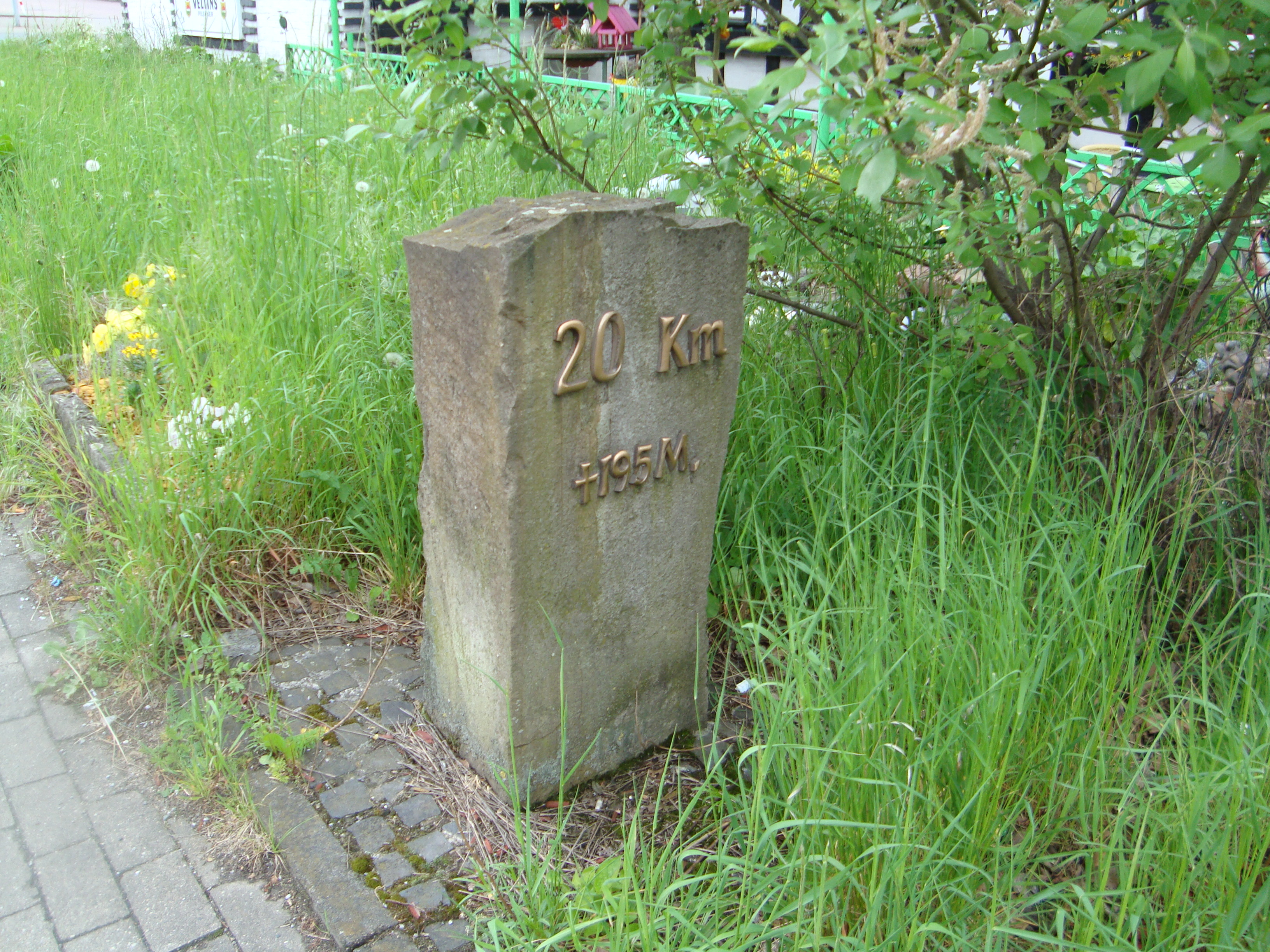 Kilometer 20 des Gahlener Kohlenwegs an der Dorstener Straße 279, Herne-Wanne